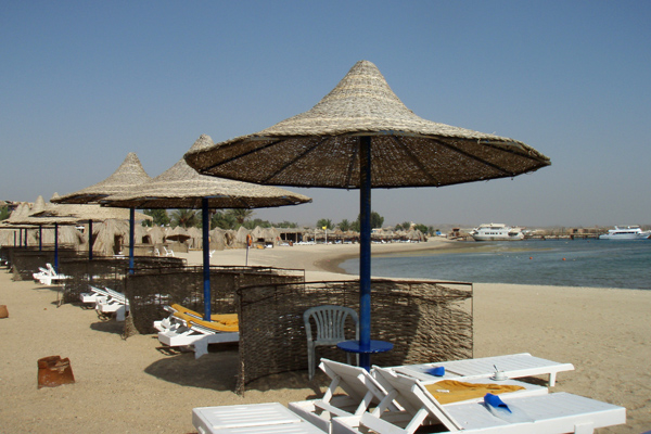 Česky: Pláž v Marsa Alam